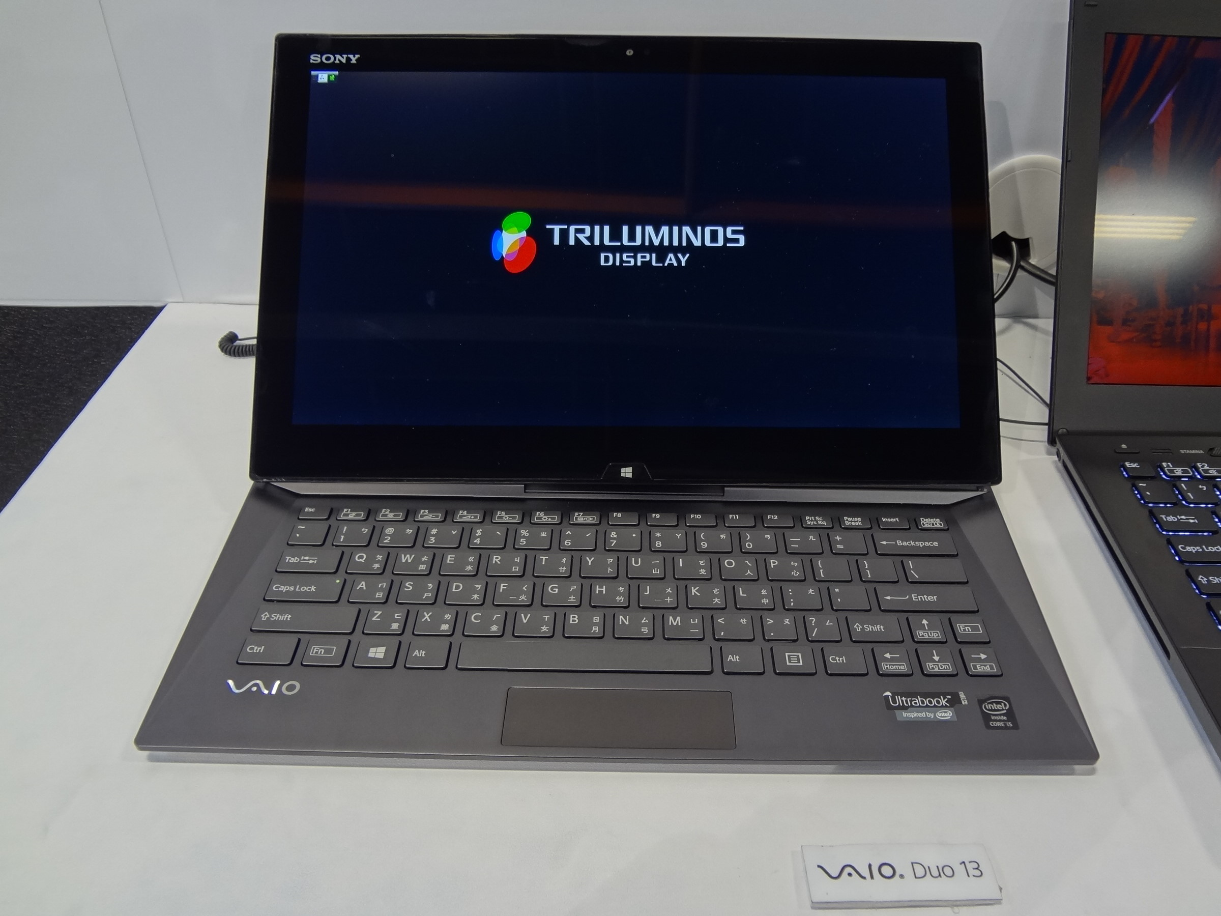 2013年資訊月，Sony攤位展示的VAIO Duo 13 Ultrabook。